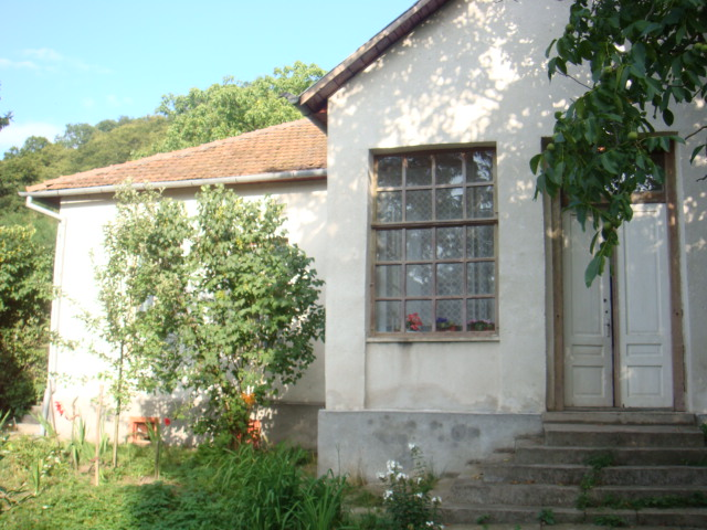 Poza 2